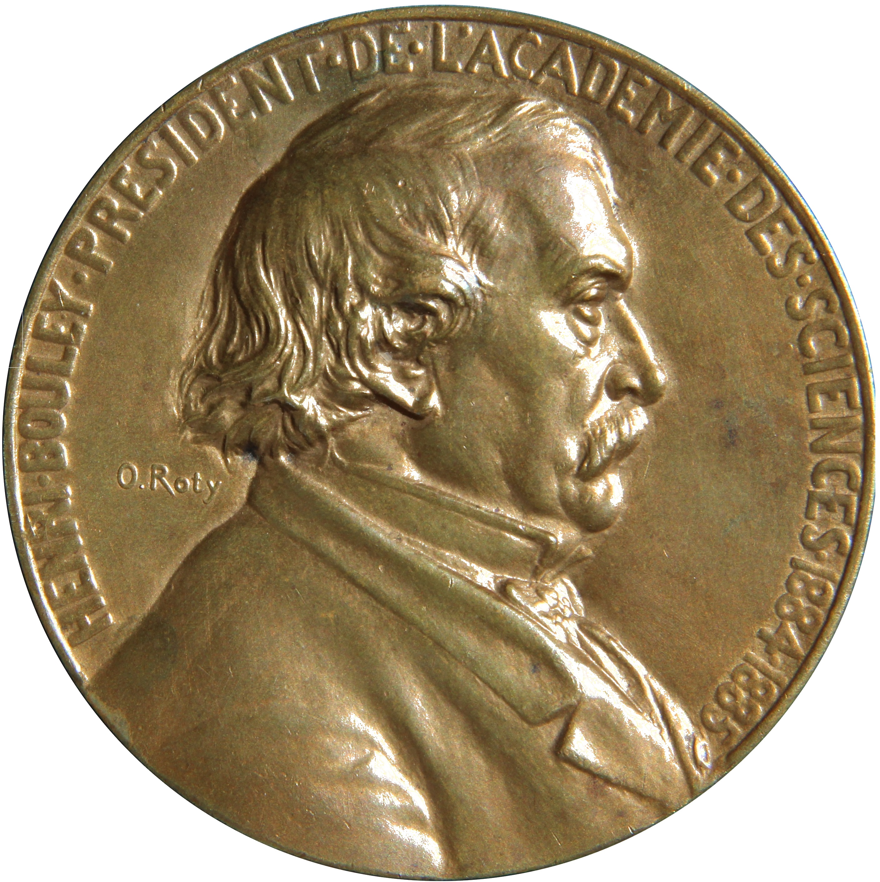 Médaille à l'effigie d'Henri Bouley (1814-1885), professeur à l'Ecole vétérinaire d'Alfort.